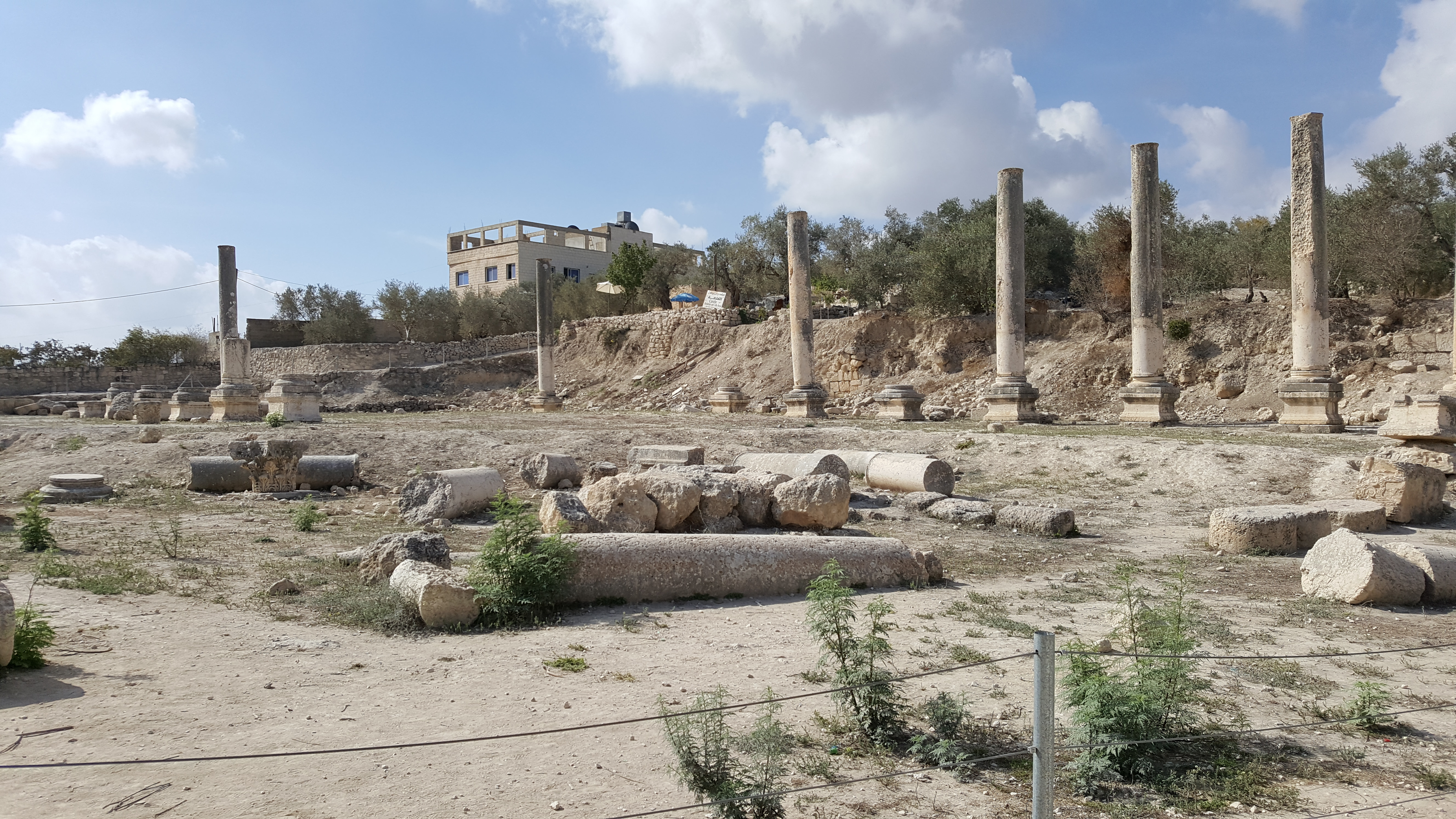 עיר קדומה בארץ ישראל. בירת ממלכת ישראל במאות ה-9 וה-8 לפנה"ס.